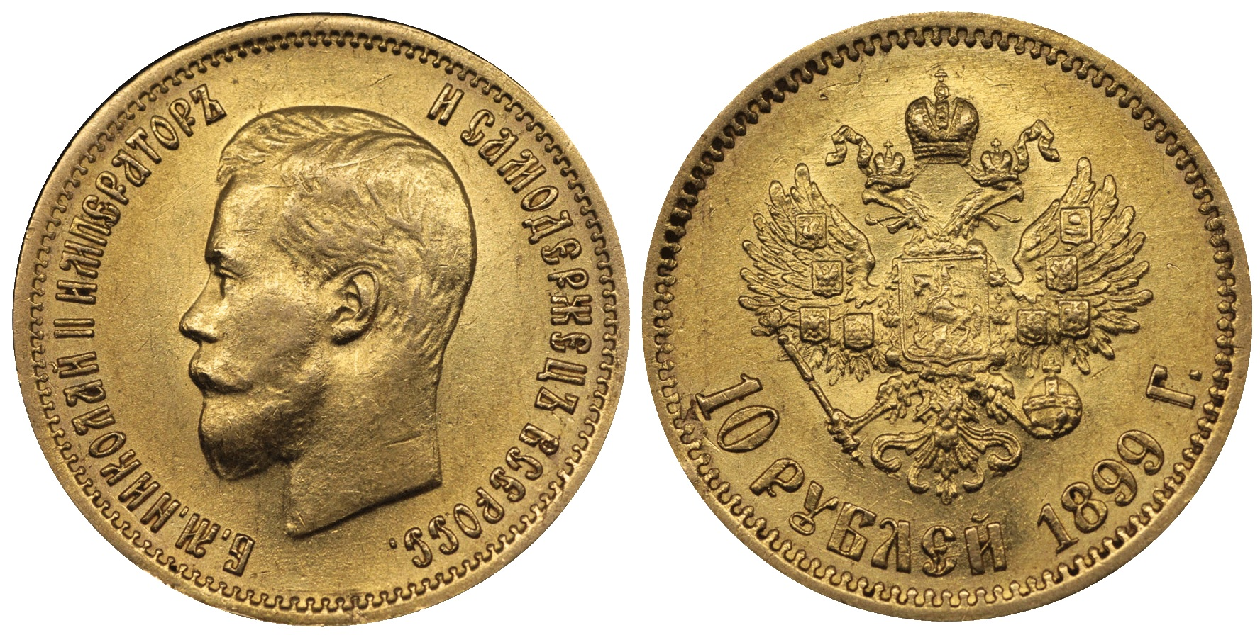 10 рублей 1899